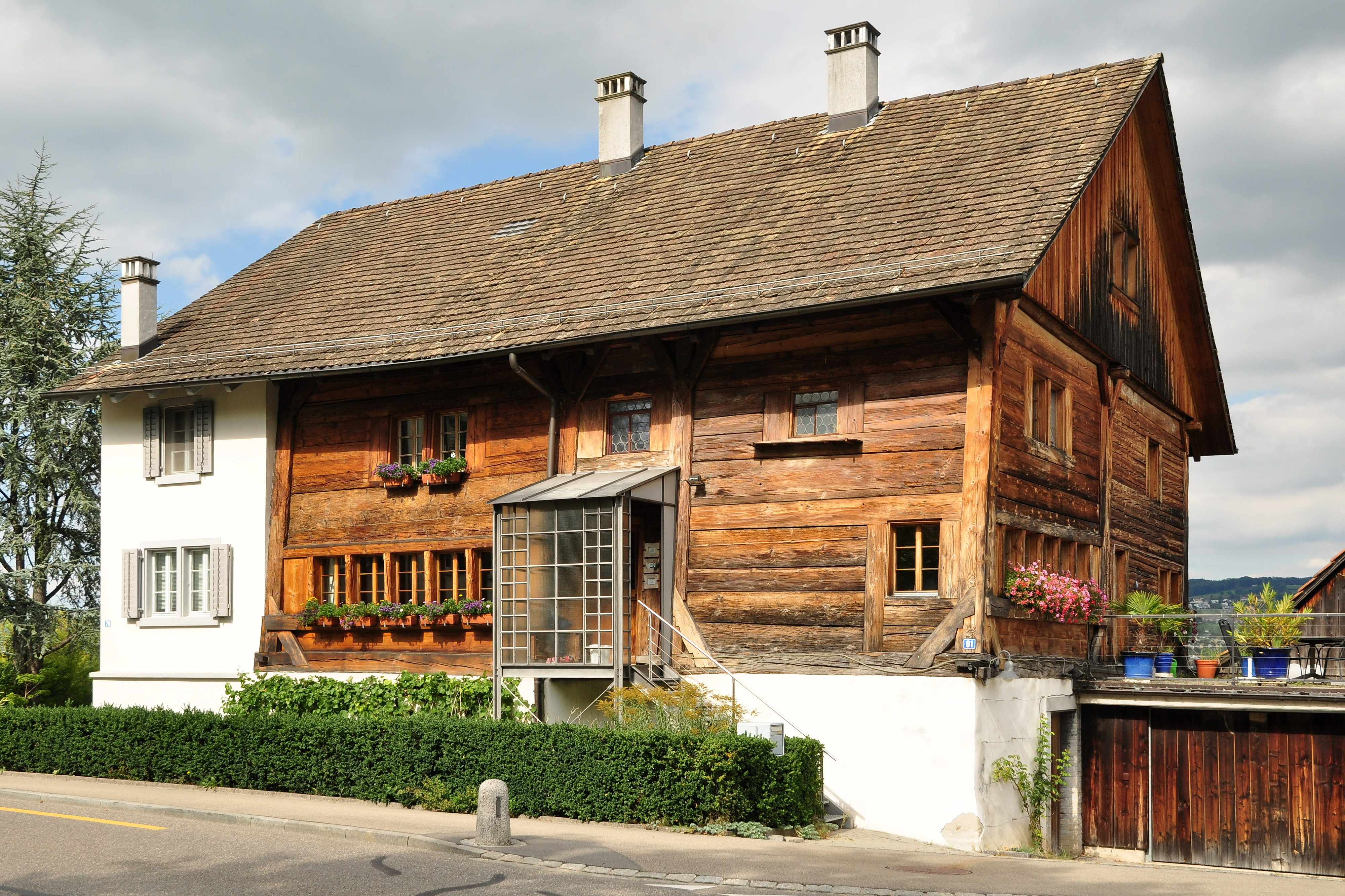 Wohnhaus Bindern, Alte Landstrasse 79/81 in Oberrieden (Switzerland)